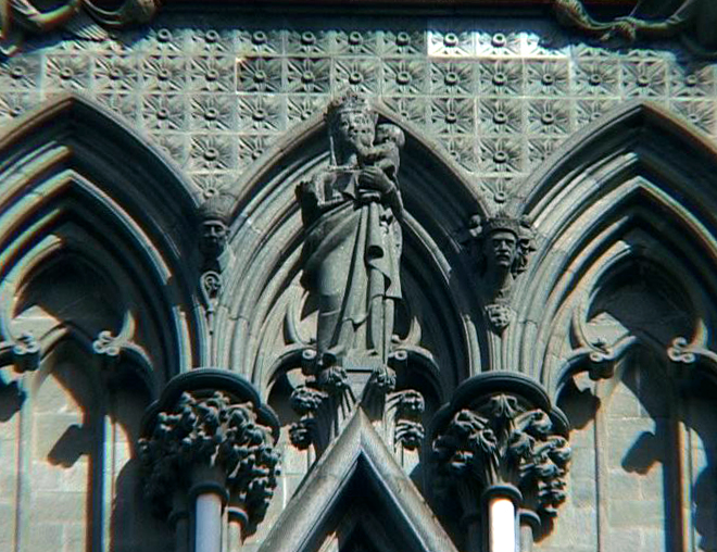 Maria med jesusbarnet på vestsiden av Nidarosdomen i Trondheim.